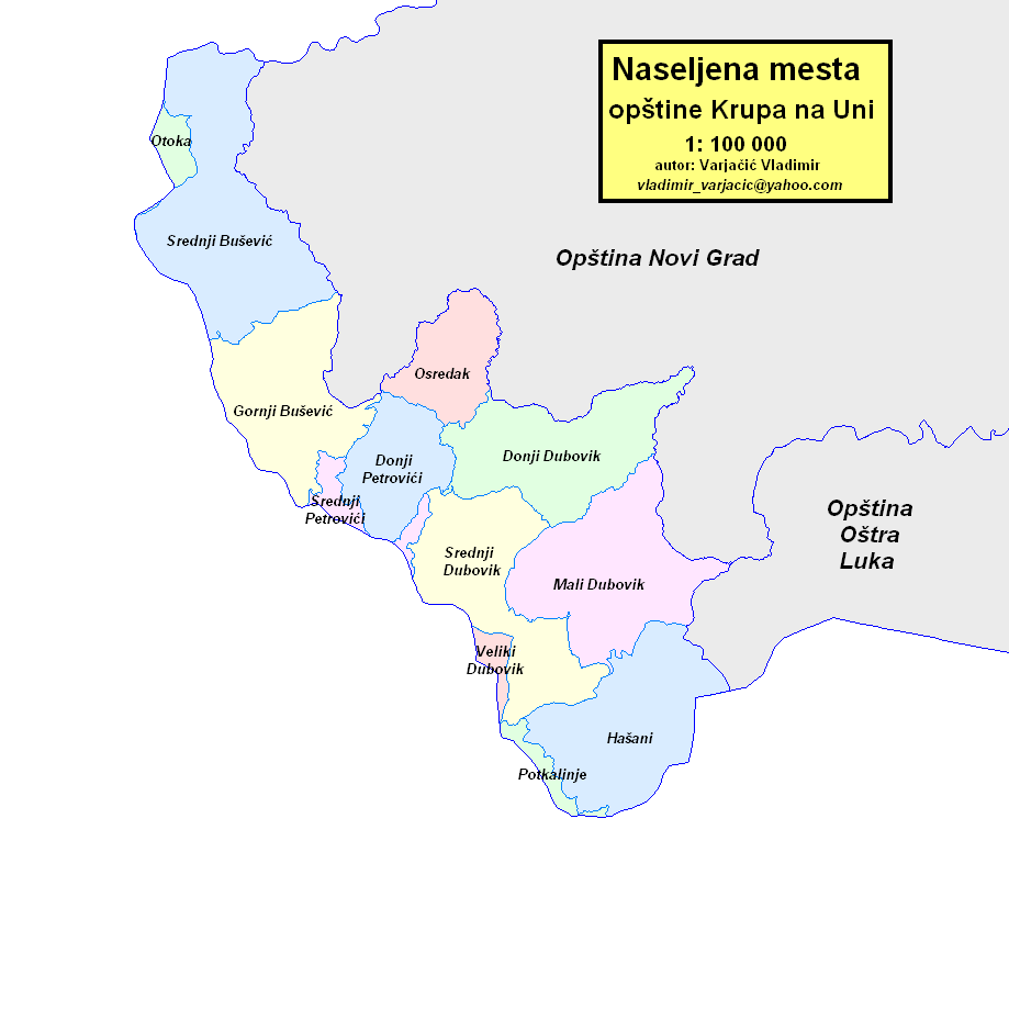 Opština Krupa na Uni